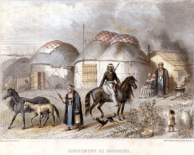 Cтоянка (лагерь) башкир. Париж 1835.